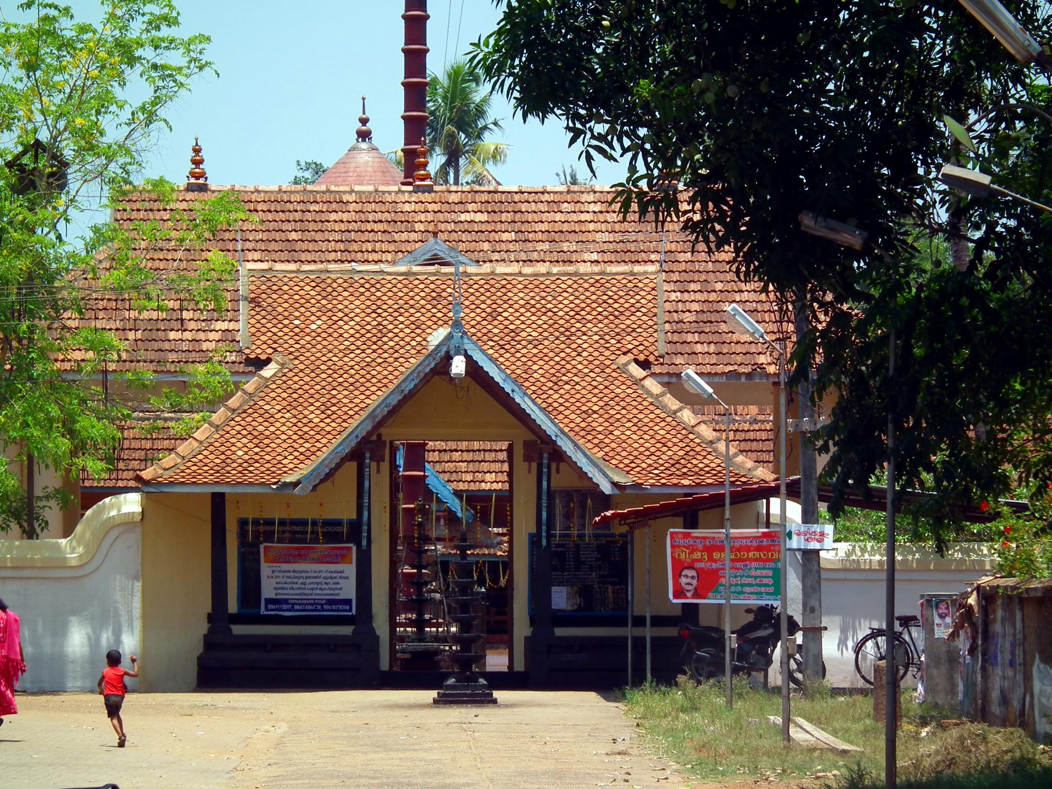 Malayalam: കേരളത്തിലെ പ്രസിദ്ധമായ ലക്ഷ്മണ ക്ഷേത്രമാണ് തിരുമൂഴിക്കുളം ലക്ഷ്മണപെരുമാൾ ക്ഷേത്രം. എറണാക്കുളം ജില്ലയുടെ വടക്കേയറ്റം ആലുവായ്ക്കും മാളയ്ക്കുമിടയിൽ മൂഴിക്കുളം ക്ഷേത്രം സ്ഥിതി ചെയ്യുന്നു. ലക്ഷ്മണന്റെ പൂർണ്ണ പ്രതിഷ്ഠയോടെ പ്രധാന ദേവനായി ആരാധിക്കുന്ന ഈ ക്ഷേത്രം പുരാതന കാലം മുതൽക്കുതന്നെ കേരളത്തിൽ ആരാധിച്ചു പോരുന്ന 108 വൈഷ്ണവ ക്ഷേത്രങ്ങളിൽ ഒന്നാണ്. ഈ ക്ഷേത്രങ്ങളിൽ ലക്ഷ്മണ പ്രതിഷ്ഠ മൂഴിക്കുളം ക്ഷേത്രത്തിൽ മാത്രമേയുള്ളു.